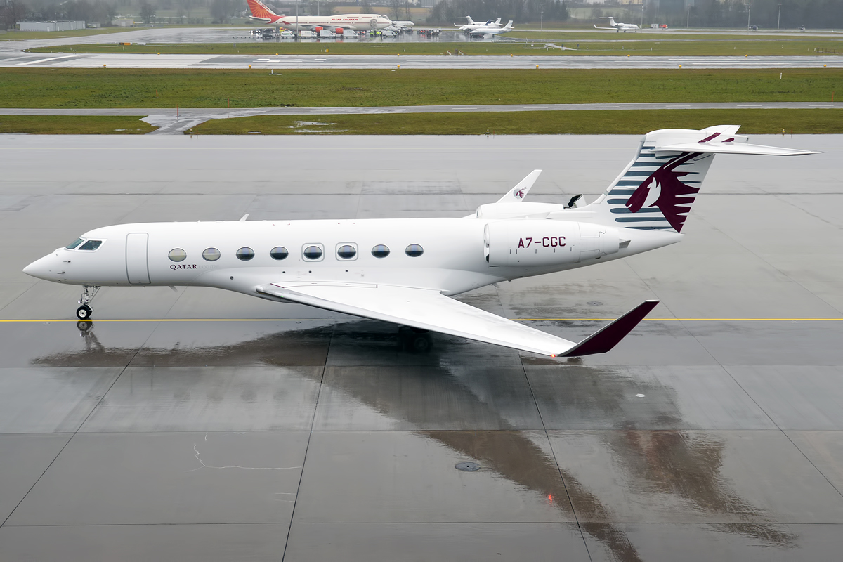 Qatar Executive, A7-CGC, Gulfstream G650